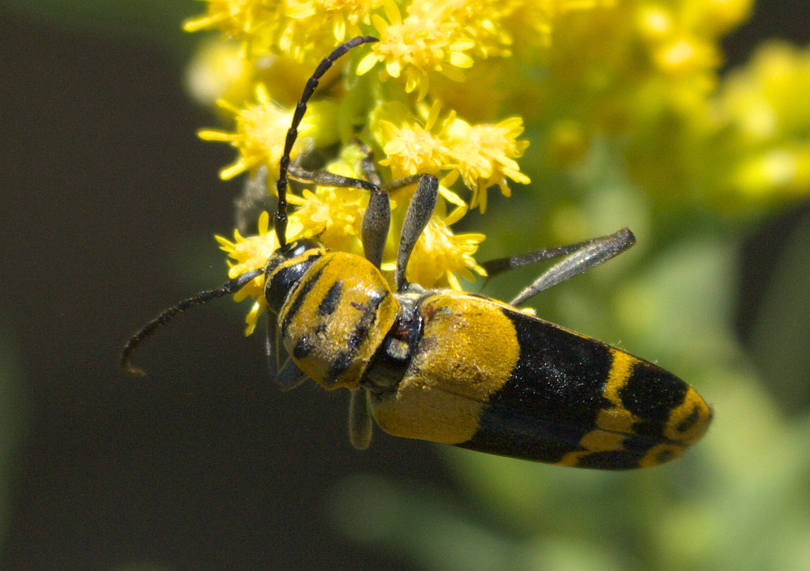 Megacyllene decora, amorpha borer, ID Confidence: 98